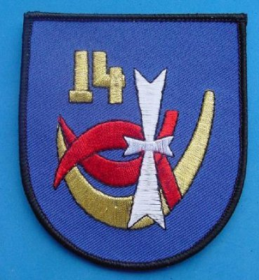 Das Wappen von U14 als Aufnäher.